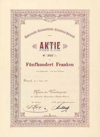 500 Franken-Aktie der Elektrischen Strassenbahn Altstätten-Berneck